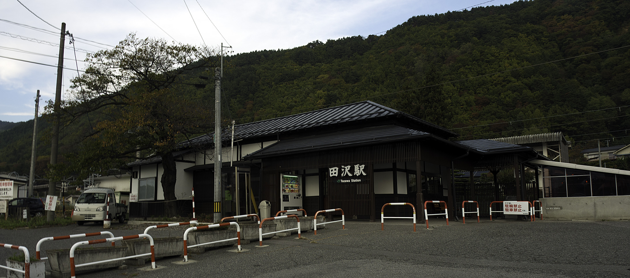 東日本旅客鉄道株式会社篠ノ井線田沢駅駅舎